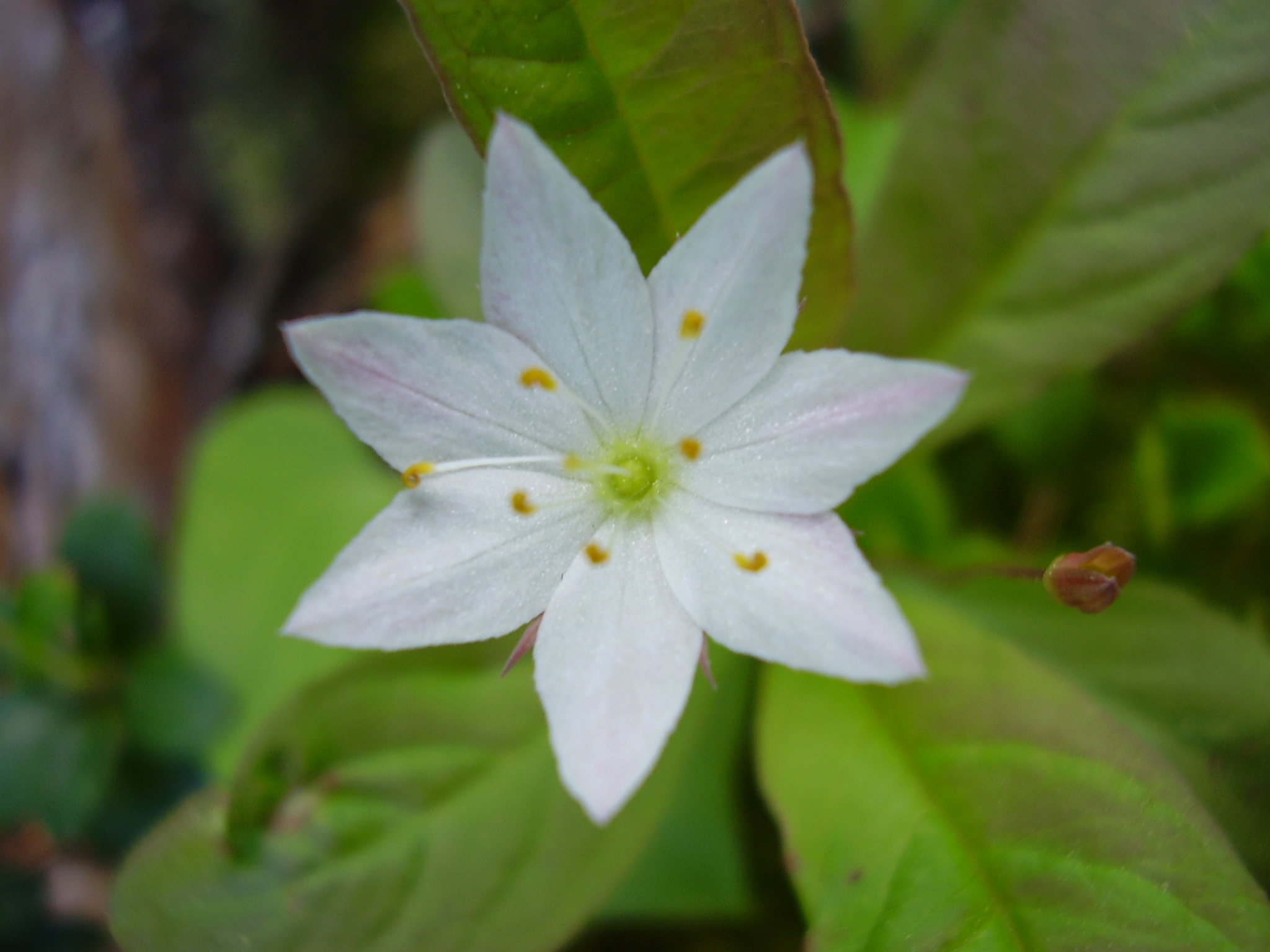 Trientalis europaea Photo taken by Käyttäjä:kompak (9th of June 2005)